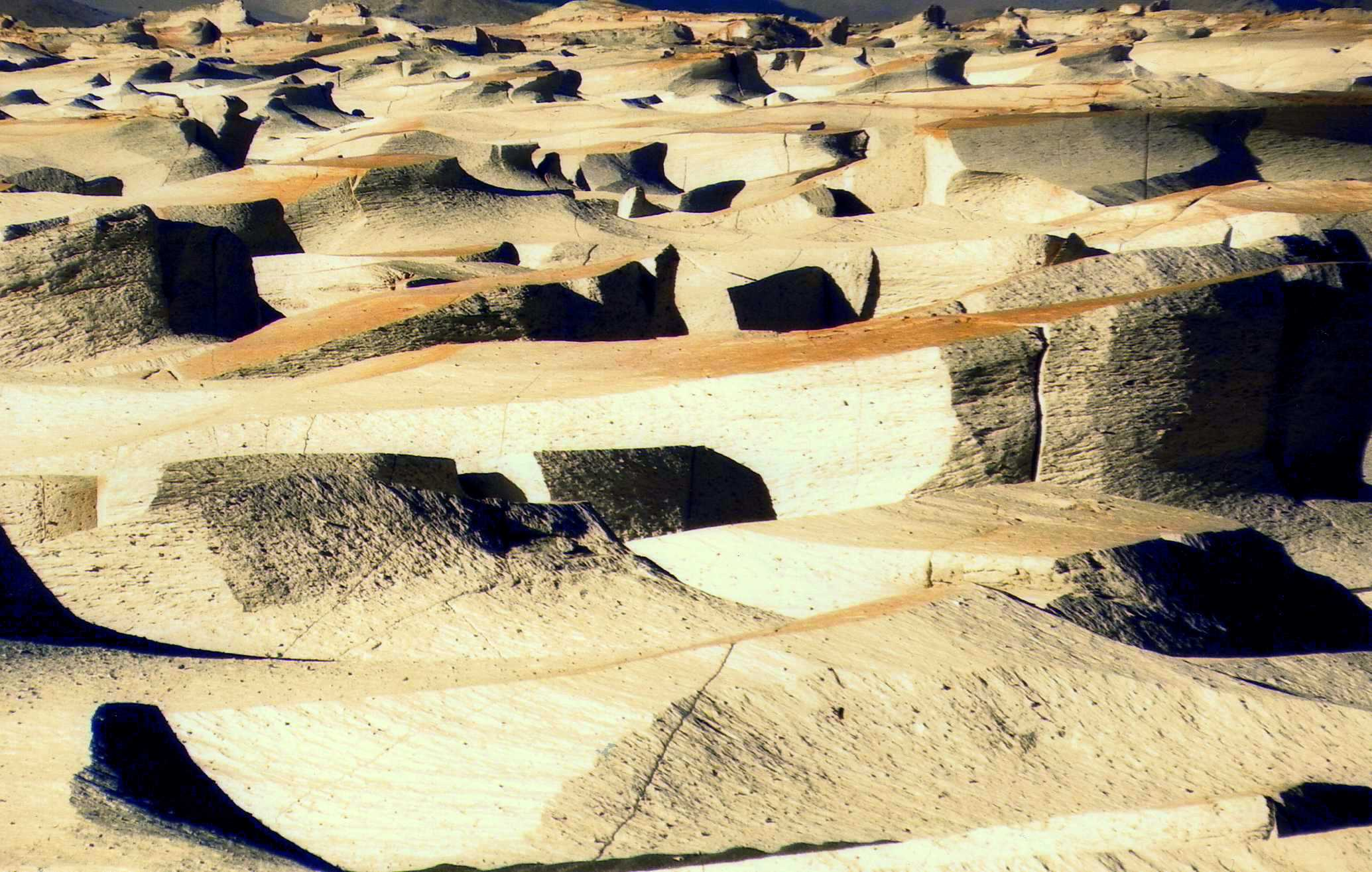 Olas de merengue quemadito, Campo de Piedra Pómez, Catamarca, Argentina